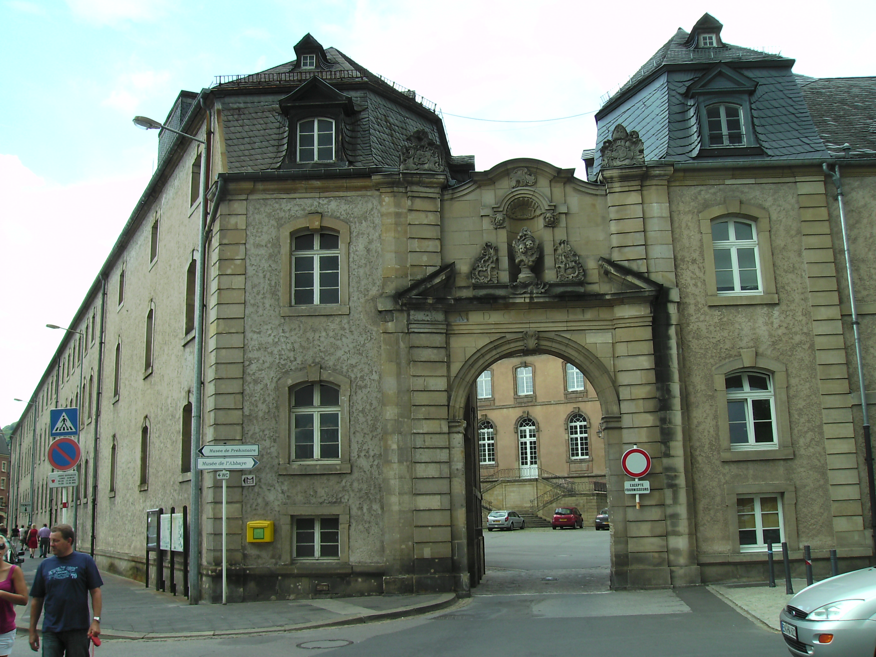 Echternach_Eingang zur Abtei